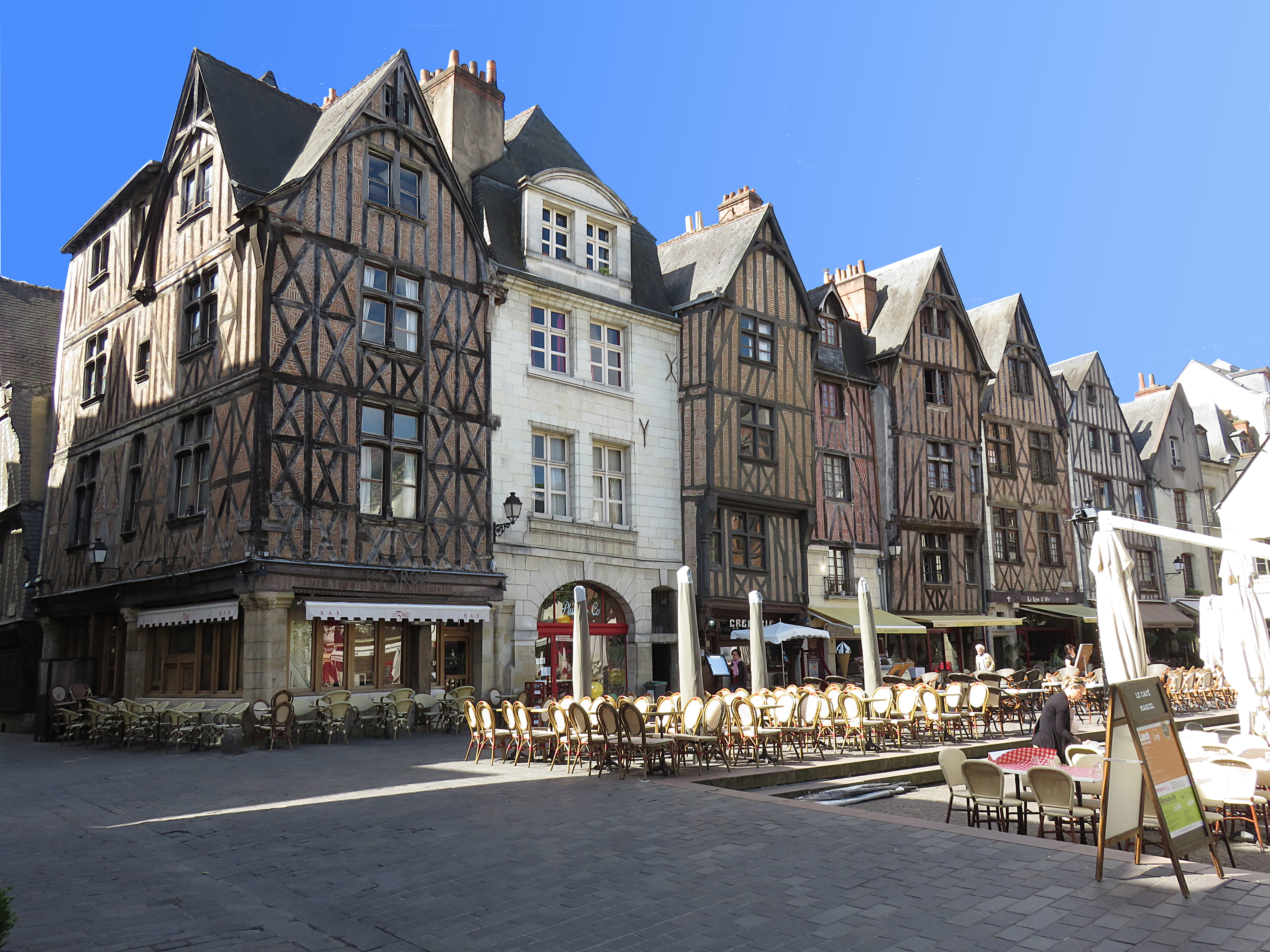 La Place Plumereau coté sud, ensemble de maisons XVe, XVIe et XVIIe siècle